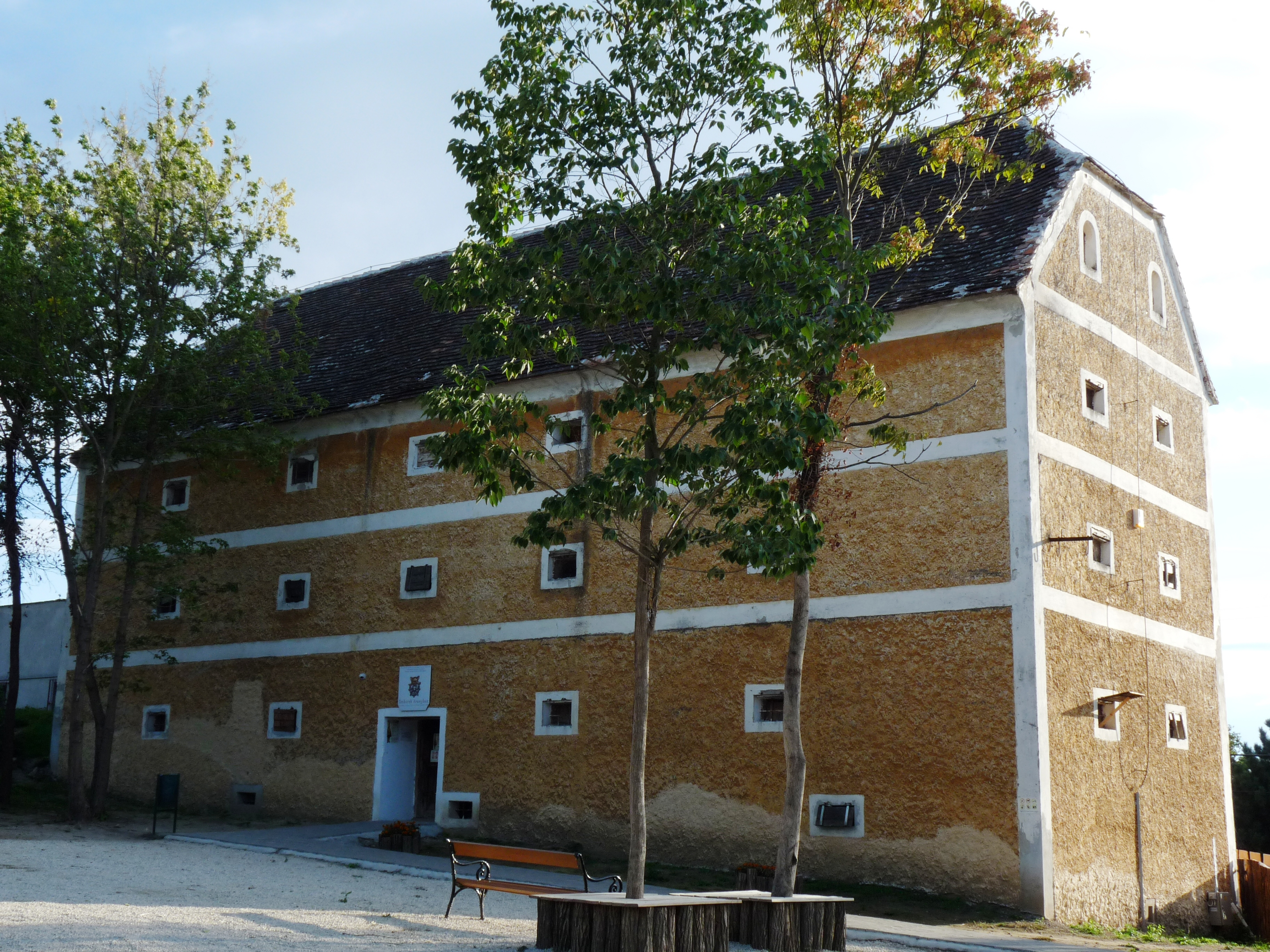 magtár, Balatonszemes This is a photo of a monument in Hungary. Identifier: 7795